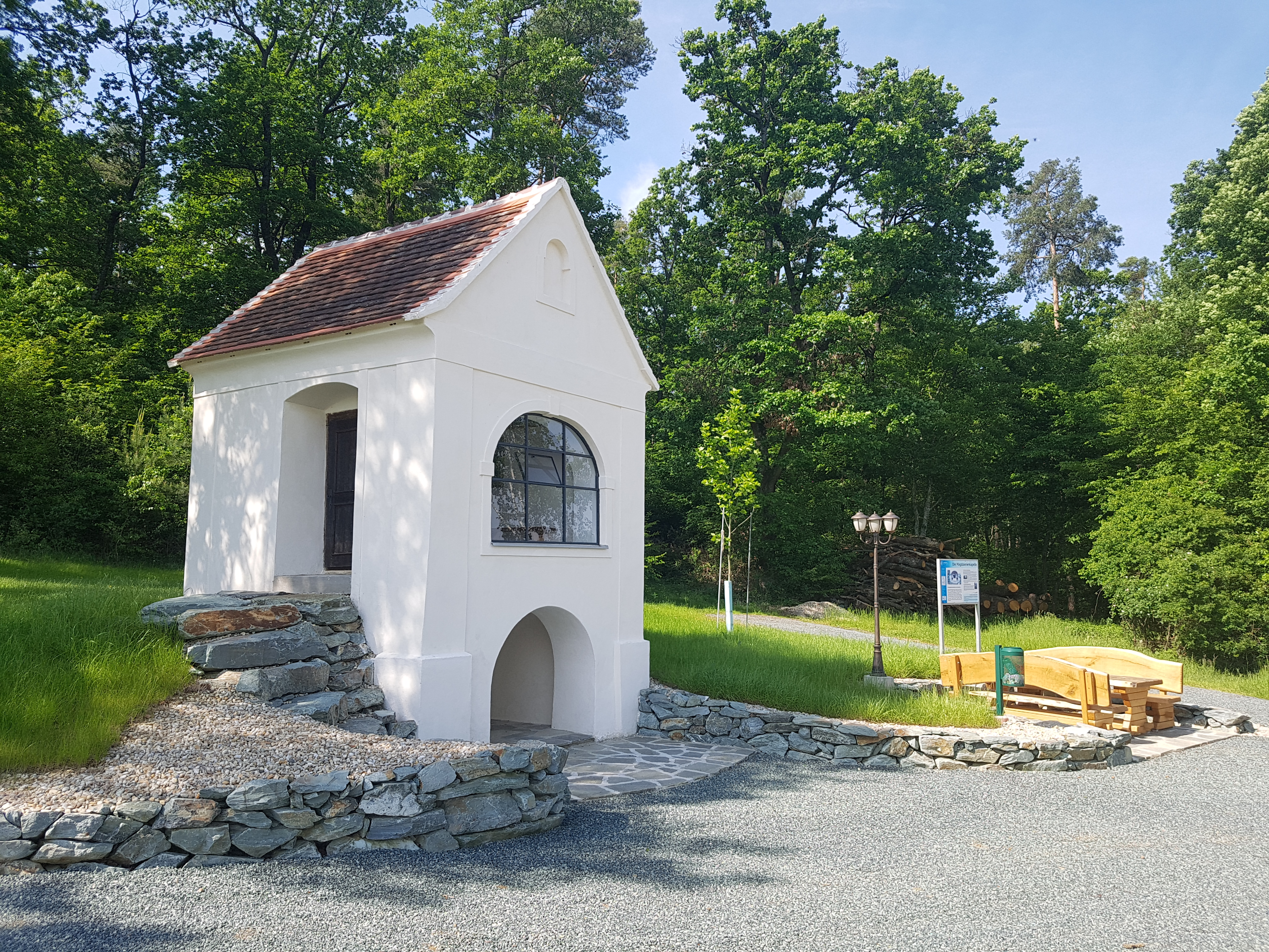 Die Magdalenenkapelle auf der südlichen Erhebung des Ortsgebietes dient als Pilgerort und auch als Ruheort für Wanderer, welche die Aussicht auf die nahegelegenen Weinberge des Csaterberges und Eisenberges genießen wollen